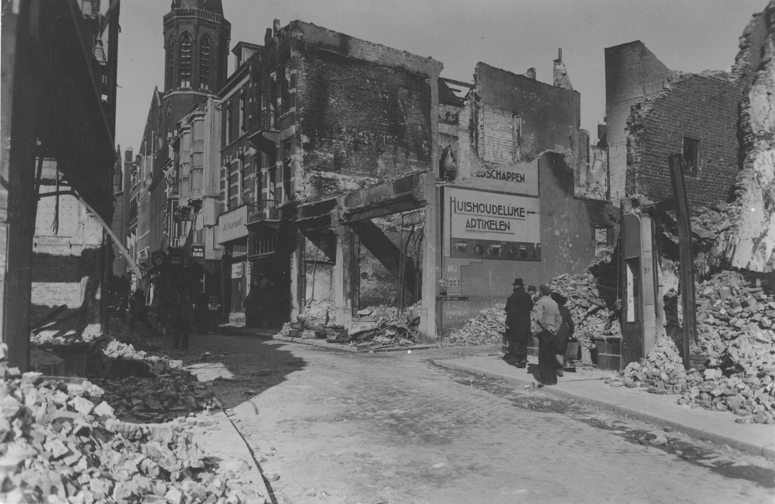 De door bombardementen verwoeste panden, gezien vanuit de Korte Molenstraat, rechts de ijzerhandel van Van Campen op de hoek met de Gruitberg, verder links van het midden de firma A.A. van der Borg.